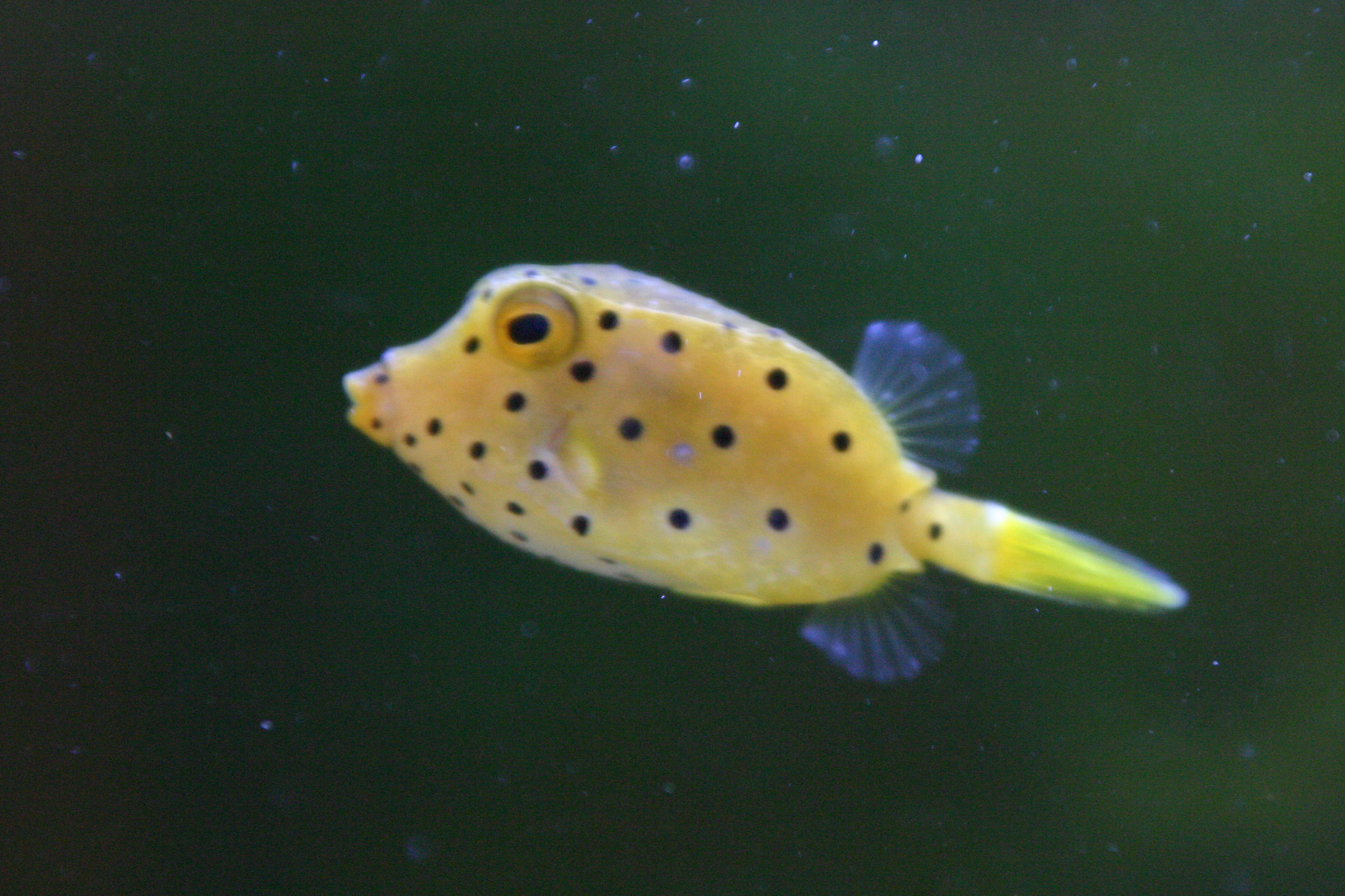 O. cubicus juvenil